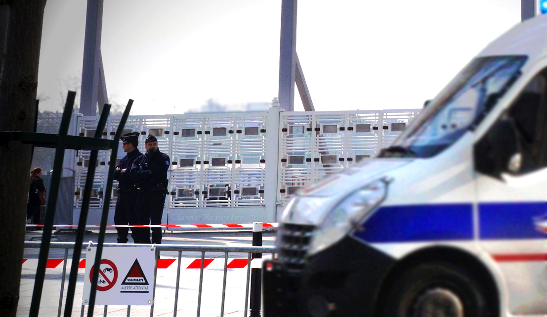 Suite aux attentats de Paris en Novembre 2015, l'état d'urgence a été décrété sur l'ensemble du territoire provoquant un renforcement de la sécurité ainsi qu'une augmentation des patrouilles de police et de militaires (plan vigipirate) dans les sites sensibles [...]. Le seuil "alerte attentat" demeure en Île-de-France alors que le seuil "vigilance renforcée" reste en application sur le reste du territoire.